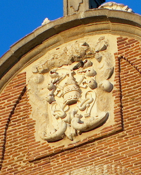 Villa de Vallecas (Madrid, España) : Iglesia de San Pedro ad Víncula, fachada principal, Escudo/Armas de San Pedro.